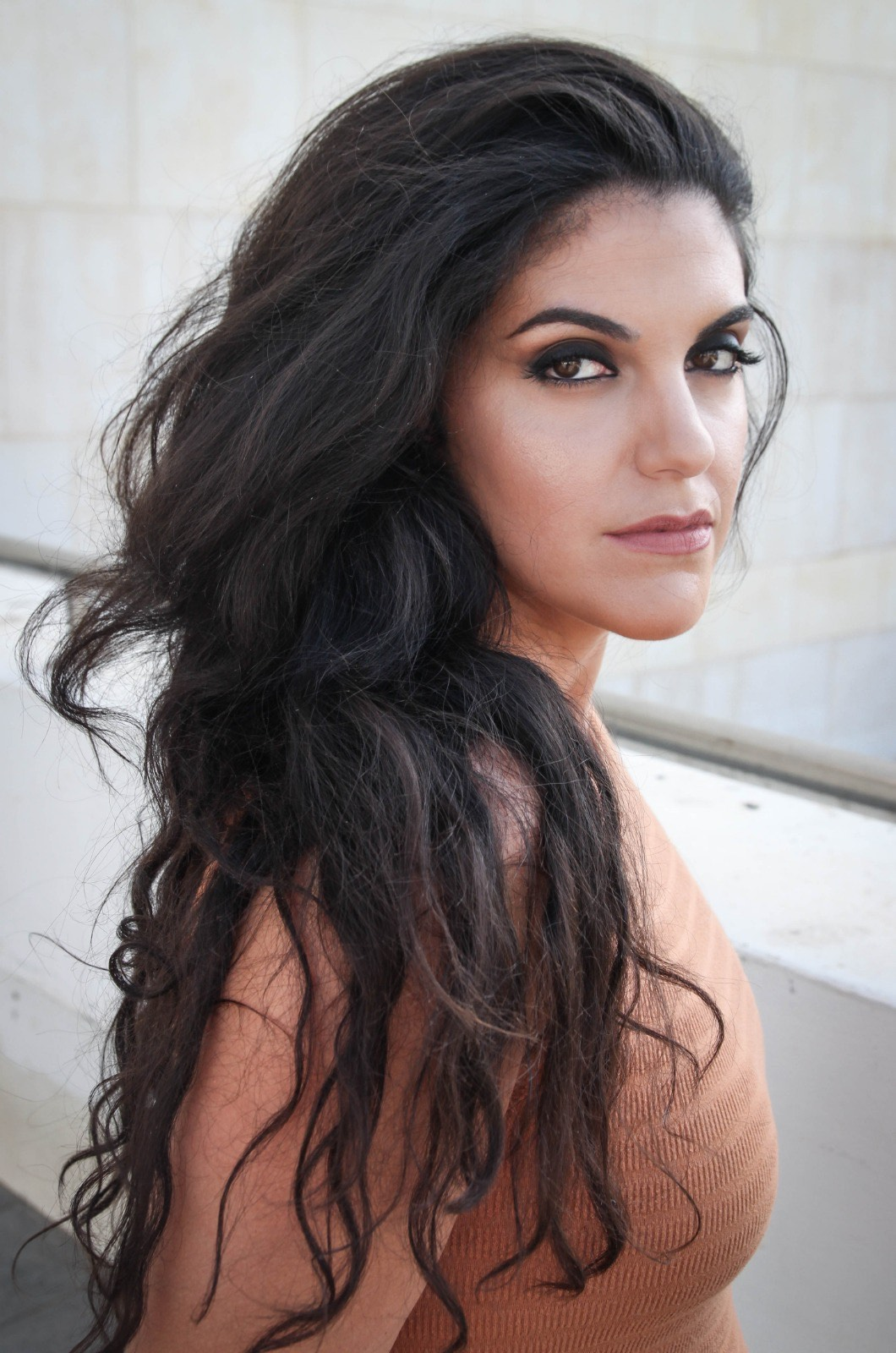 צילום של מאיה בואנוס בתל אביב